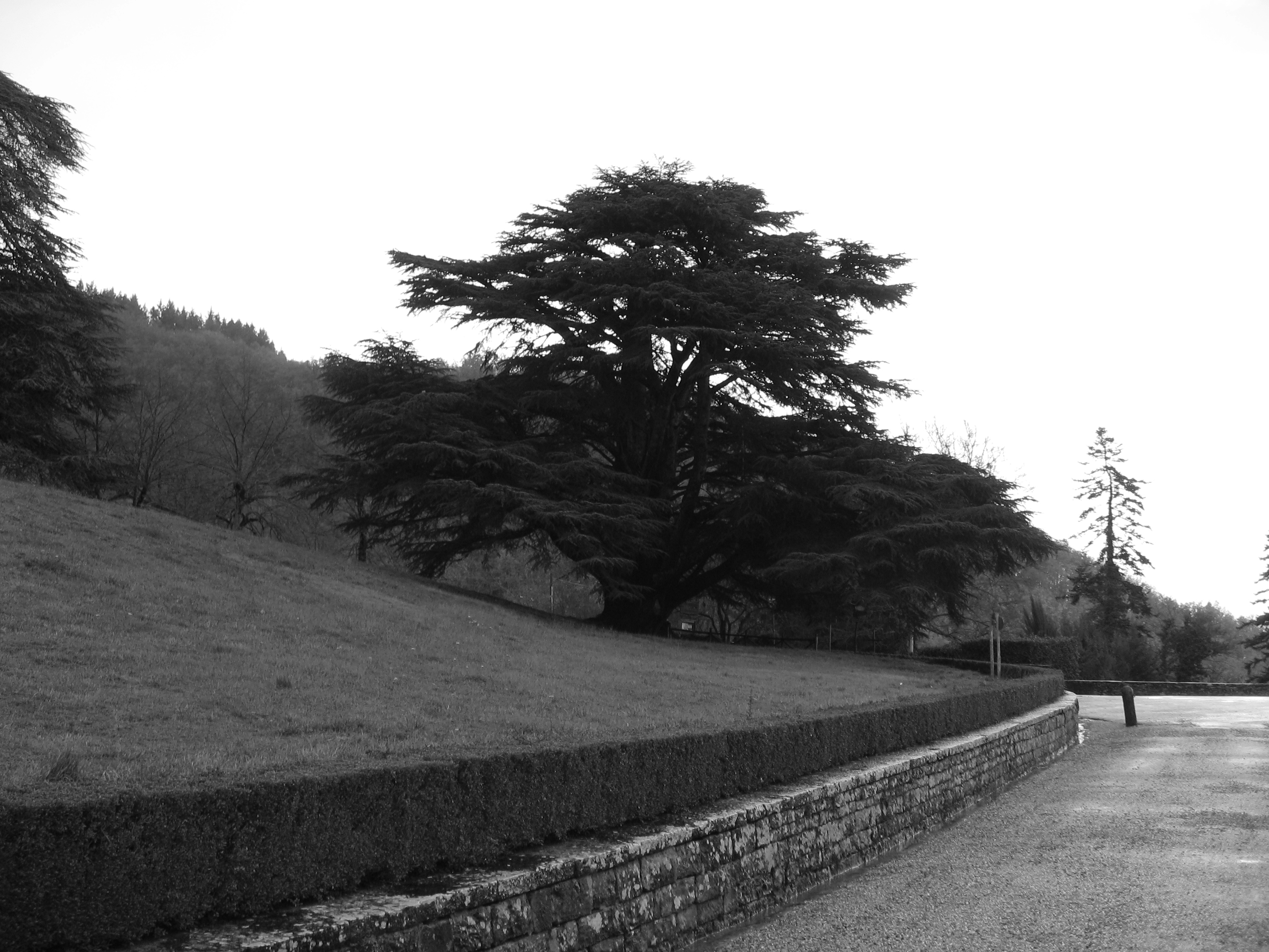 Cedro del Libano secolare, in località Badia a Coltibuono (SI).